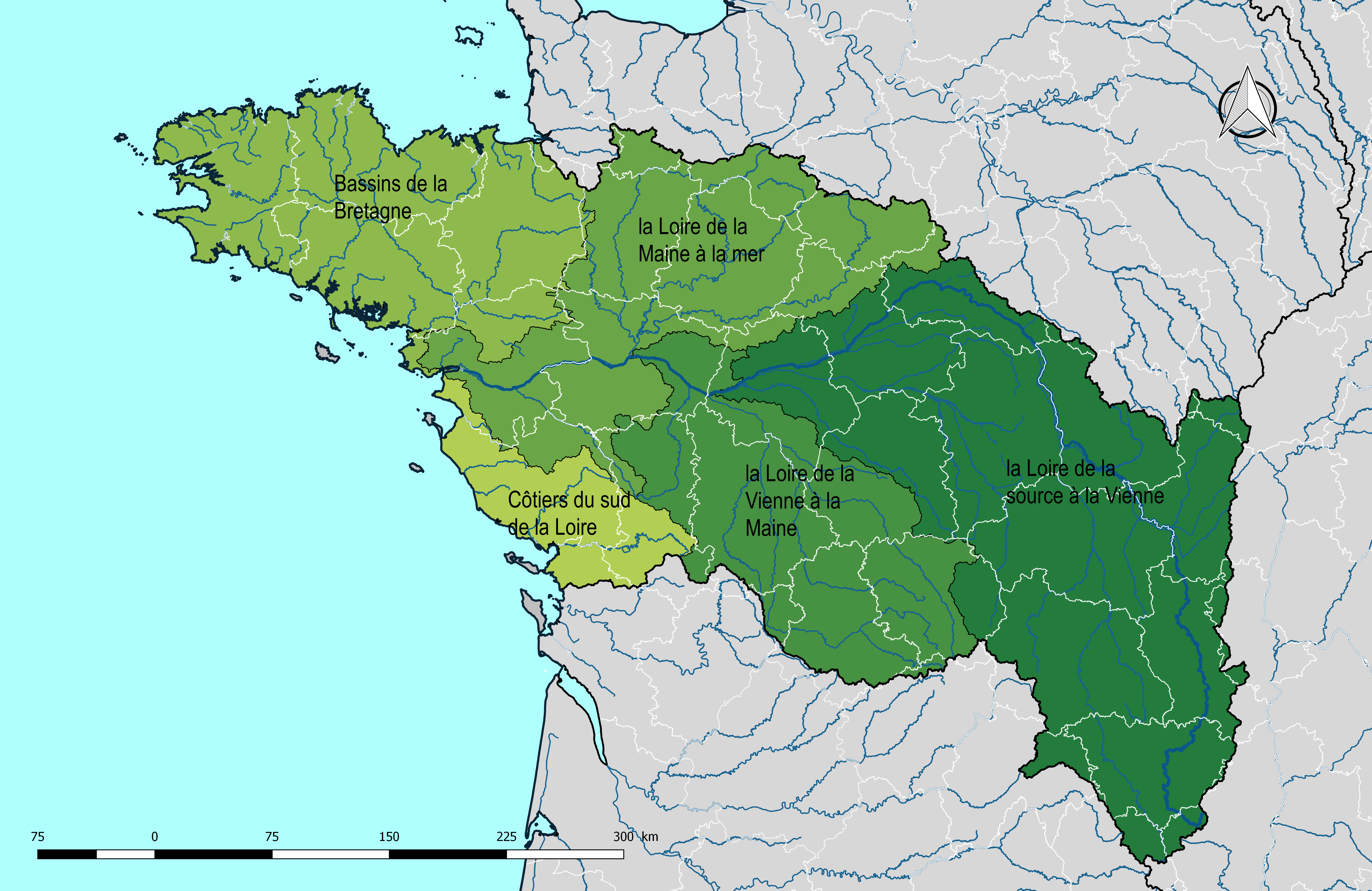 Découpage du bassin Loire-Bretagne (France) en régions hydrographqiues.